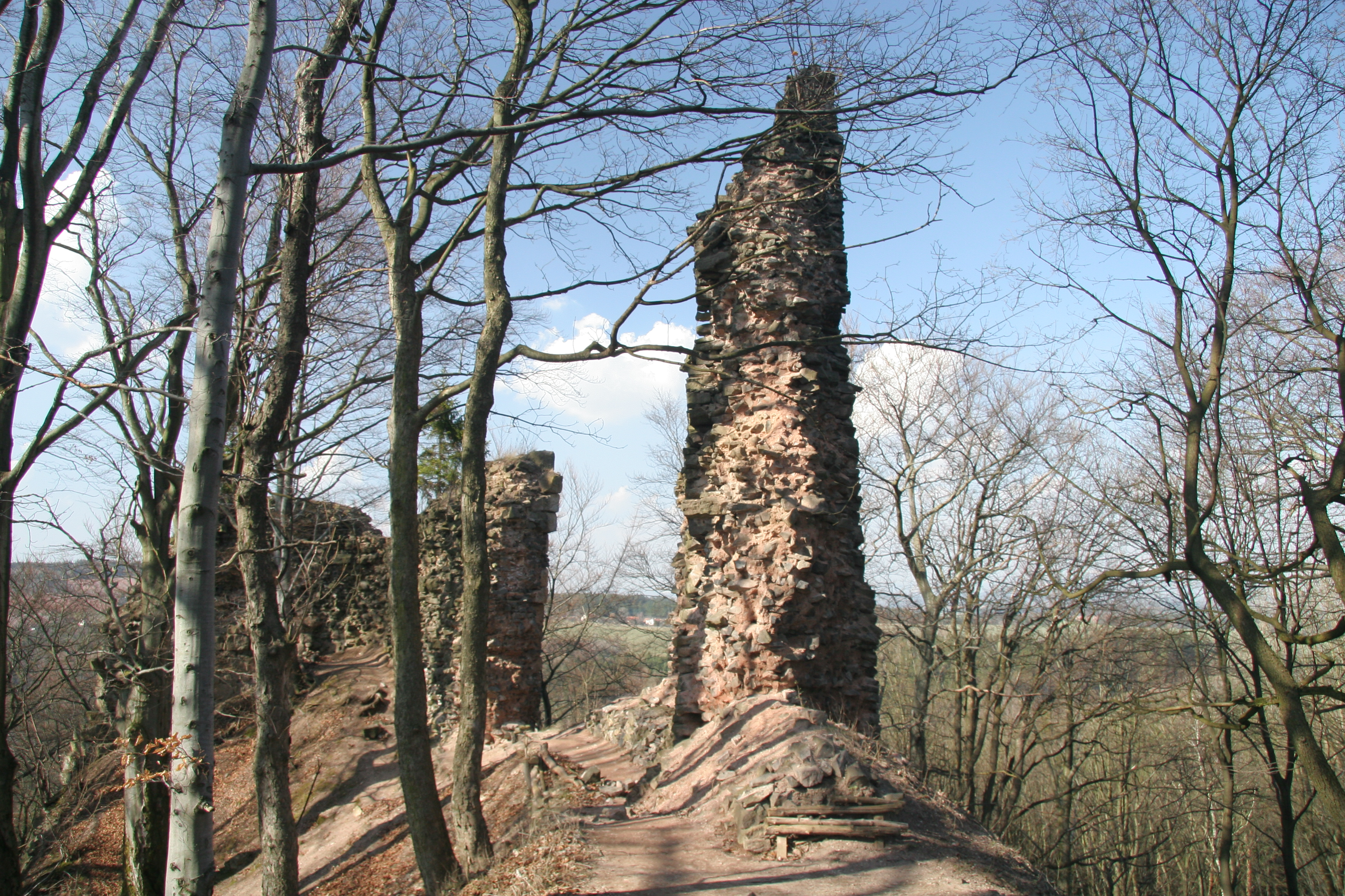 Hrad Bradlec, zřícenina (Újezdec), Újezdec